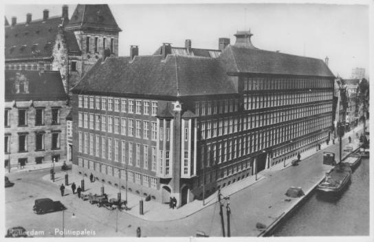 Politiebureau aan het Haagseveer